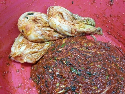 김장